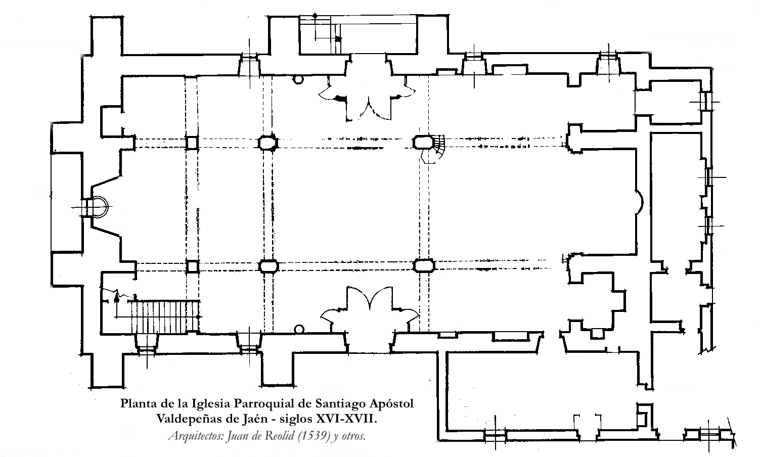 Plan of the Parish Church of Santiago Apóstol de Valdepeñas de Jaén, ss. XVI-XVII. Architects: Juan de Reolid (1539), Cristóbal del Castillo (s.XVI), Juan de Aranda Salazar (S. XVII) and others.